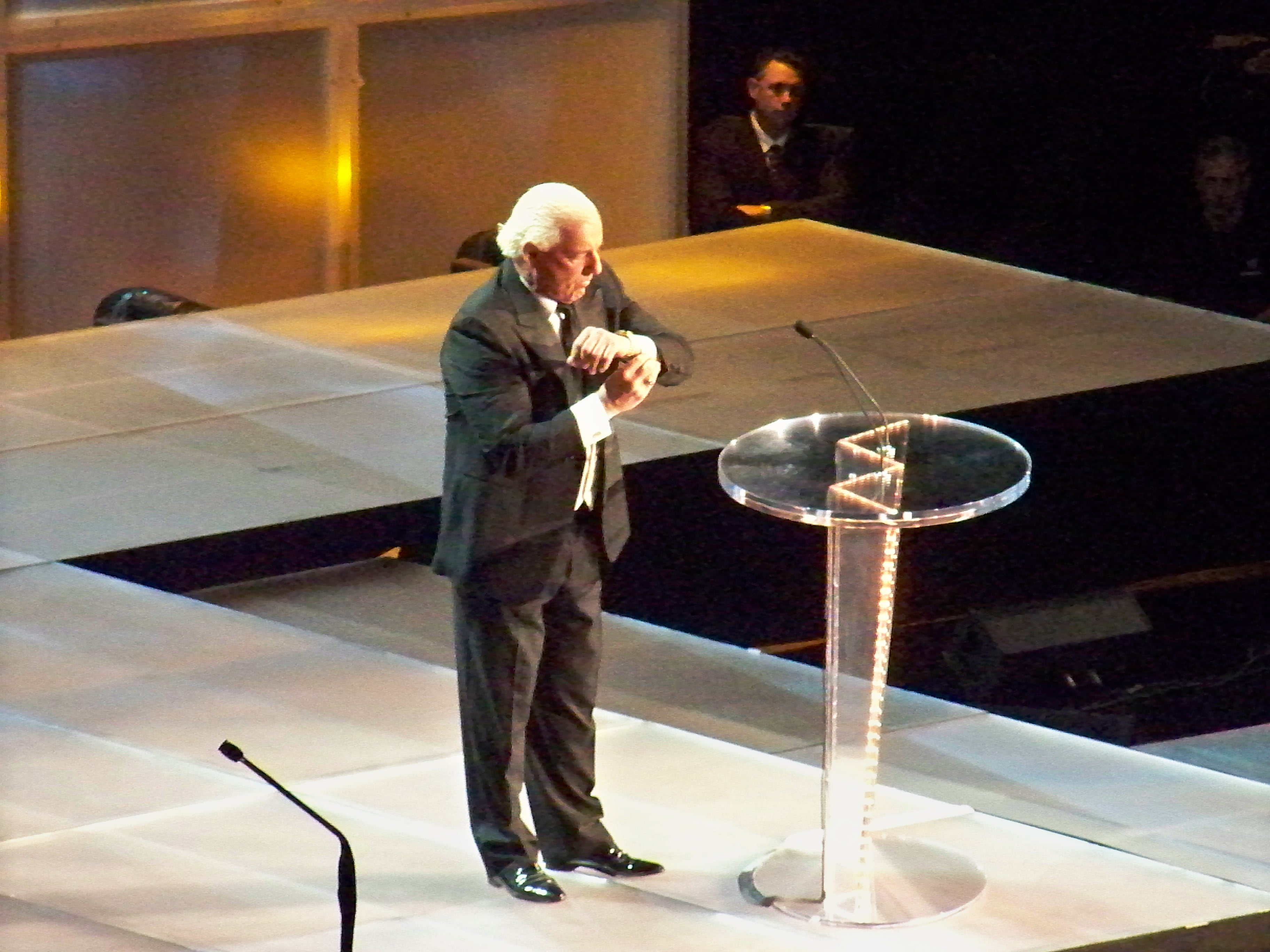 Il a encore fait referance a sa montre que HBK lui a offert l'an dernier